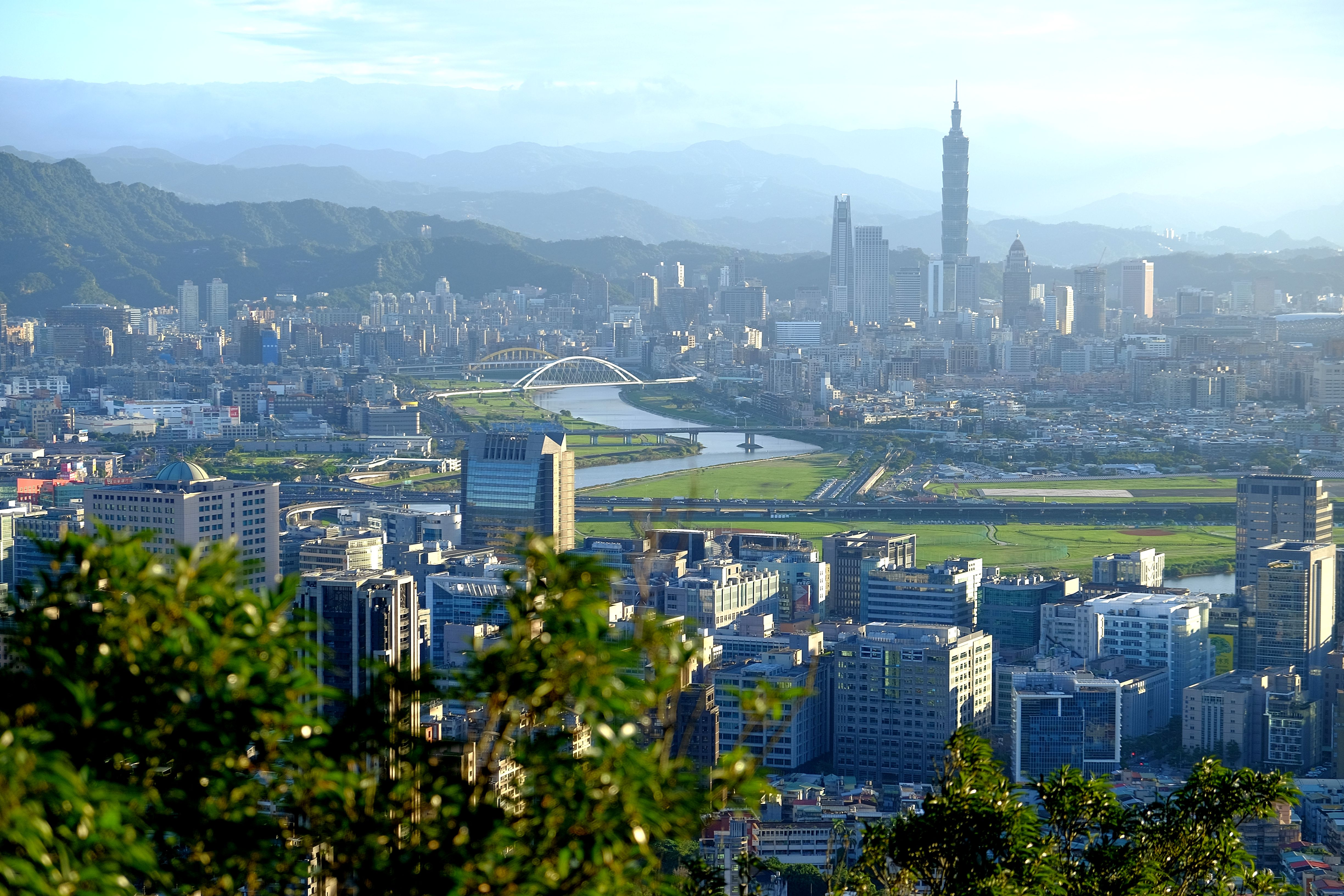 Minquan Bridge2017 TAIWAN